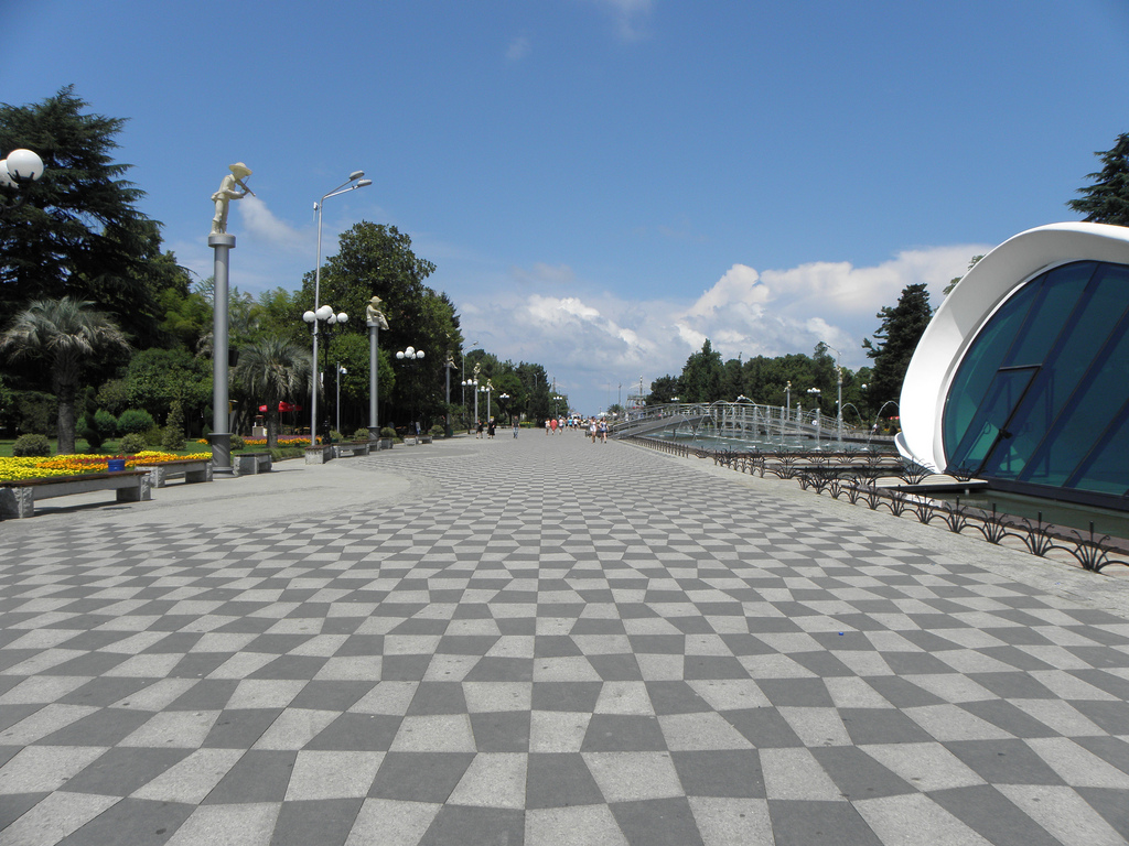 Boulevard in Batumi, Georgia